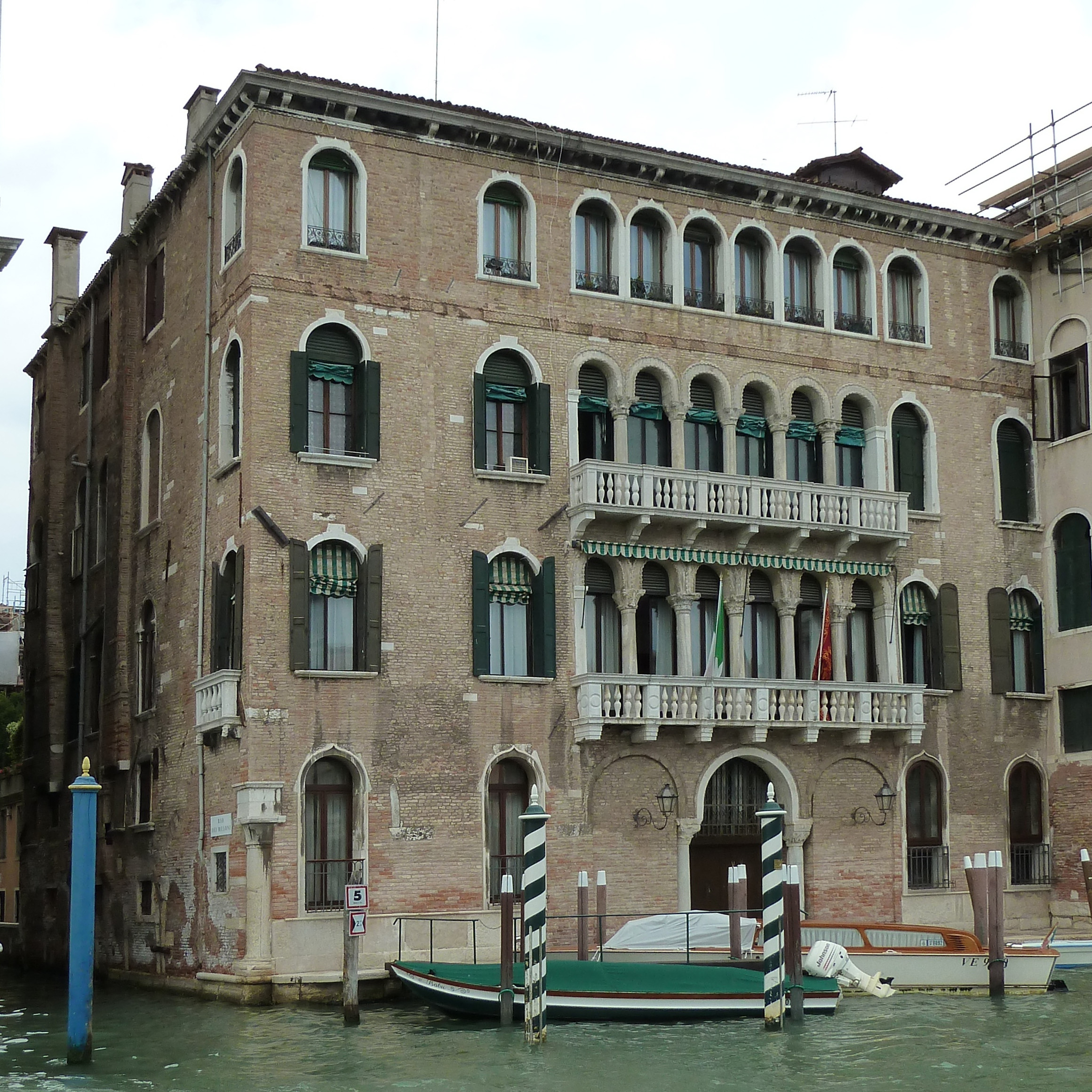 Palazzo Giustinian Businello, adjusted perspective